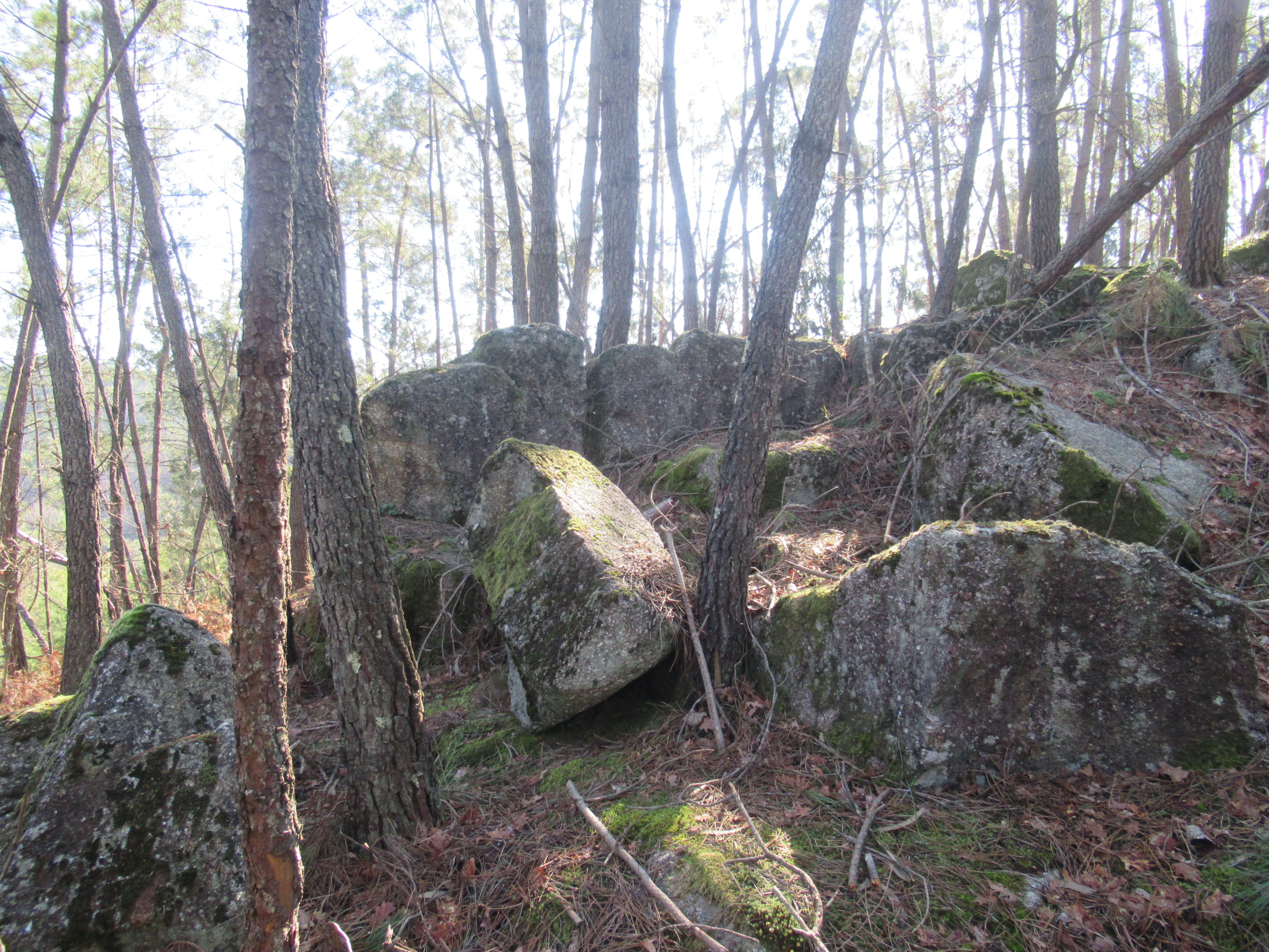 Pedras em descida para o Rio Dinha, no Castro de Nandufe